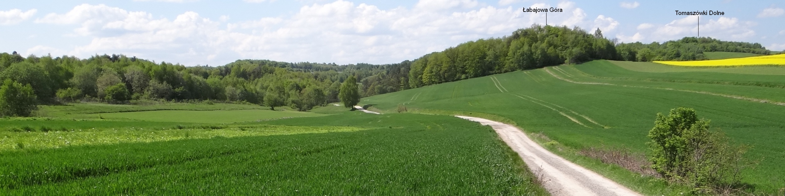 Widok od wschodniej strony na wzniesienia nad Doliną Będkowską